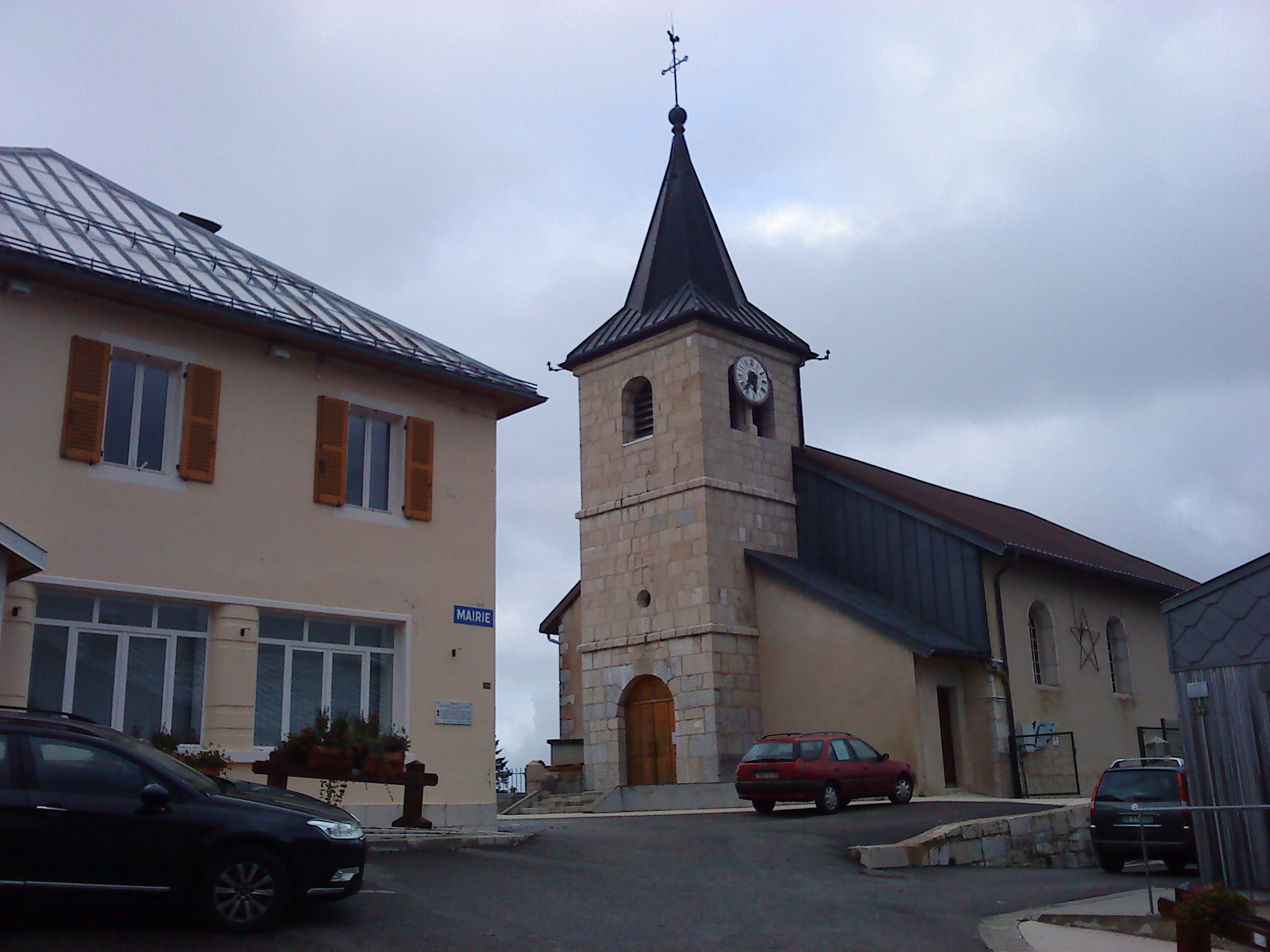 Mairie et église de Prémanon, département du Jura, France